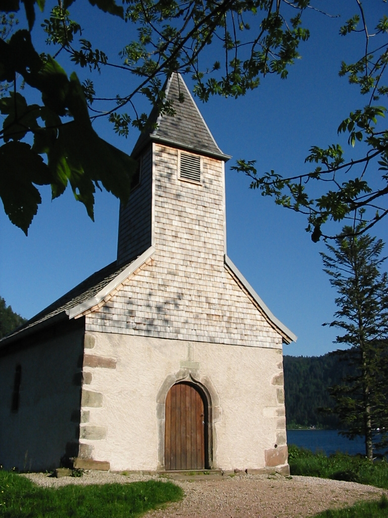 Lac de Longemer : la chapelle Saint-Florent Commune de Xonrupt-Longemer (88400), France Photographie personnelle prise le 9 juin 2004. Copyright © Christian Amet